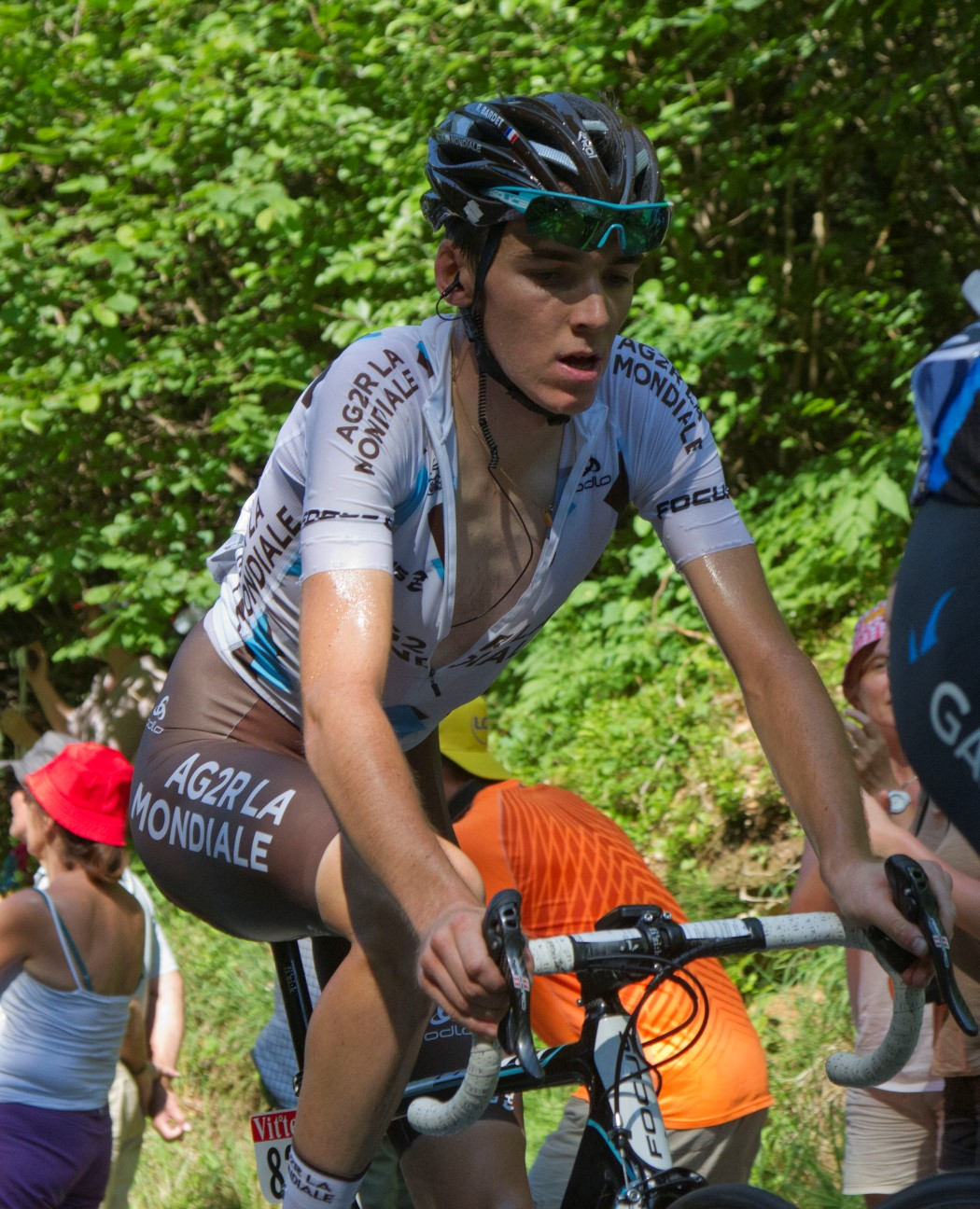 498 bardet